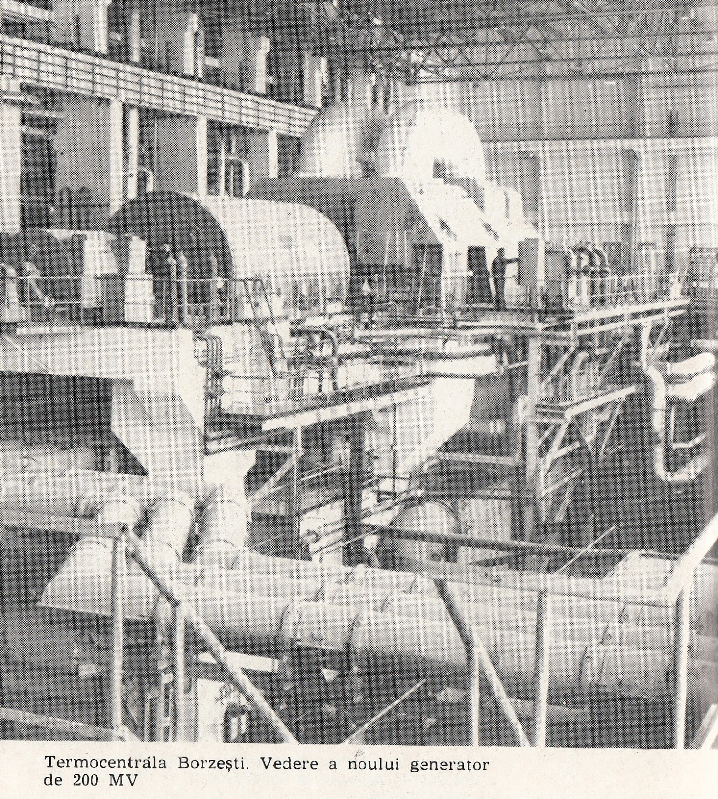 Volum: Județele Patriei - Bacău (1980)